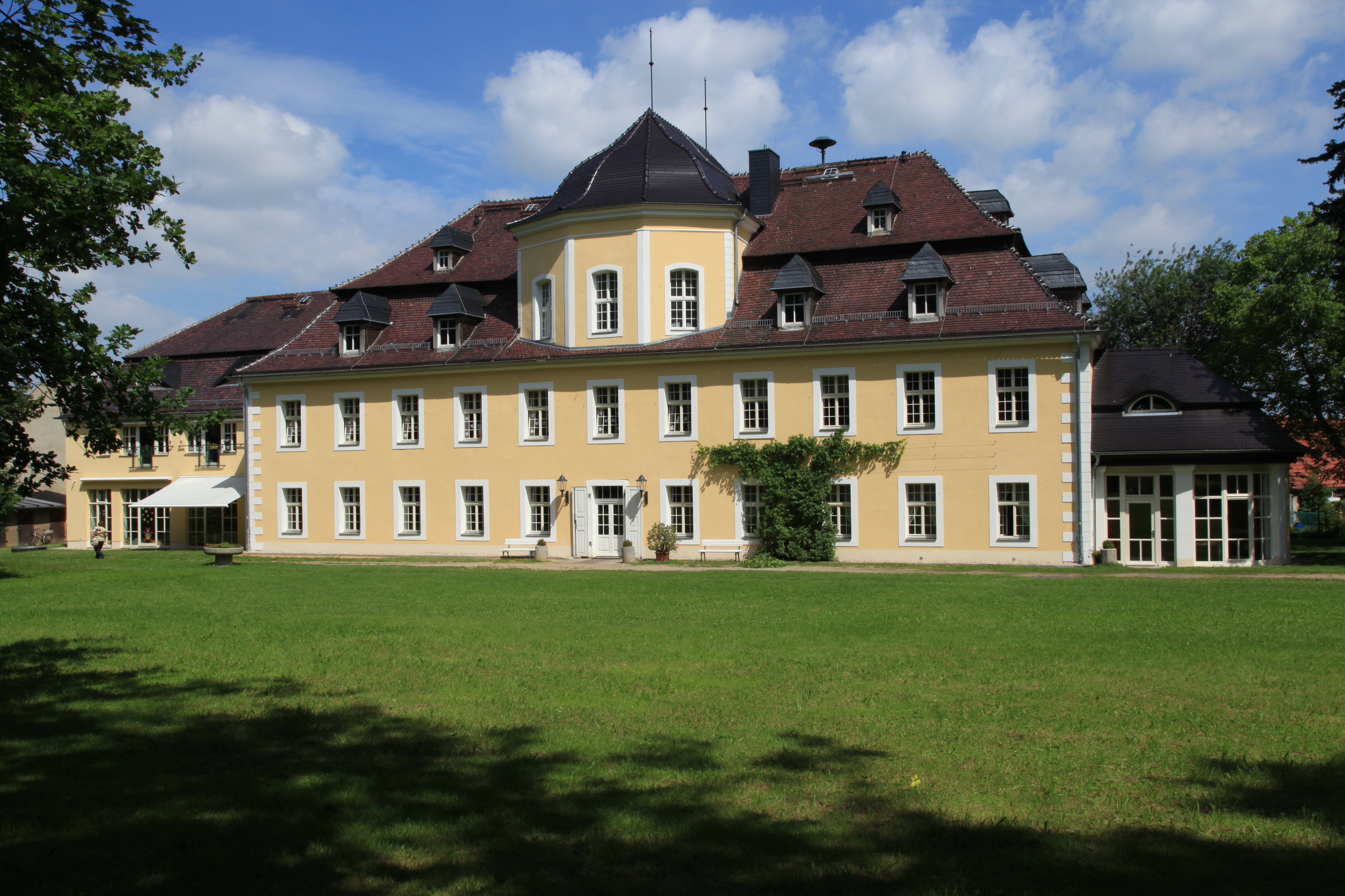 Schloss Kittlitz, Ringstraße in Kittlitz, Löbau